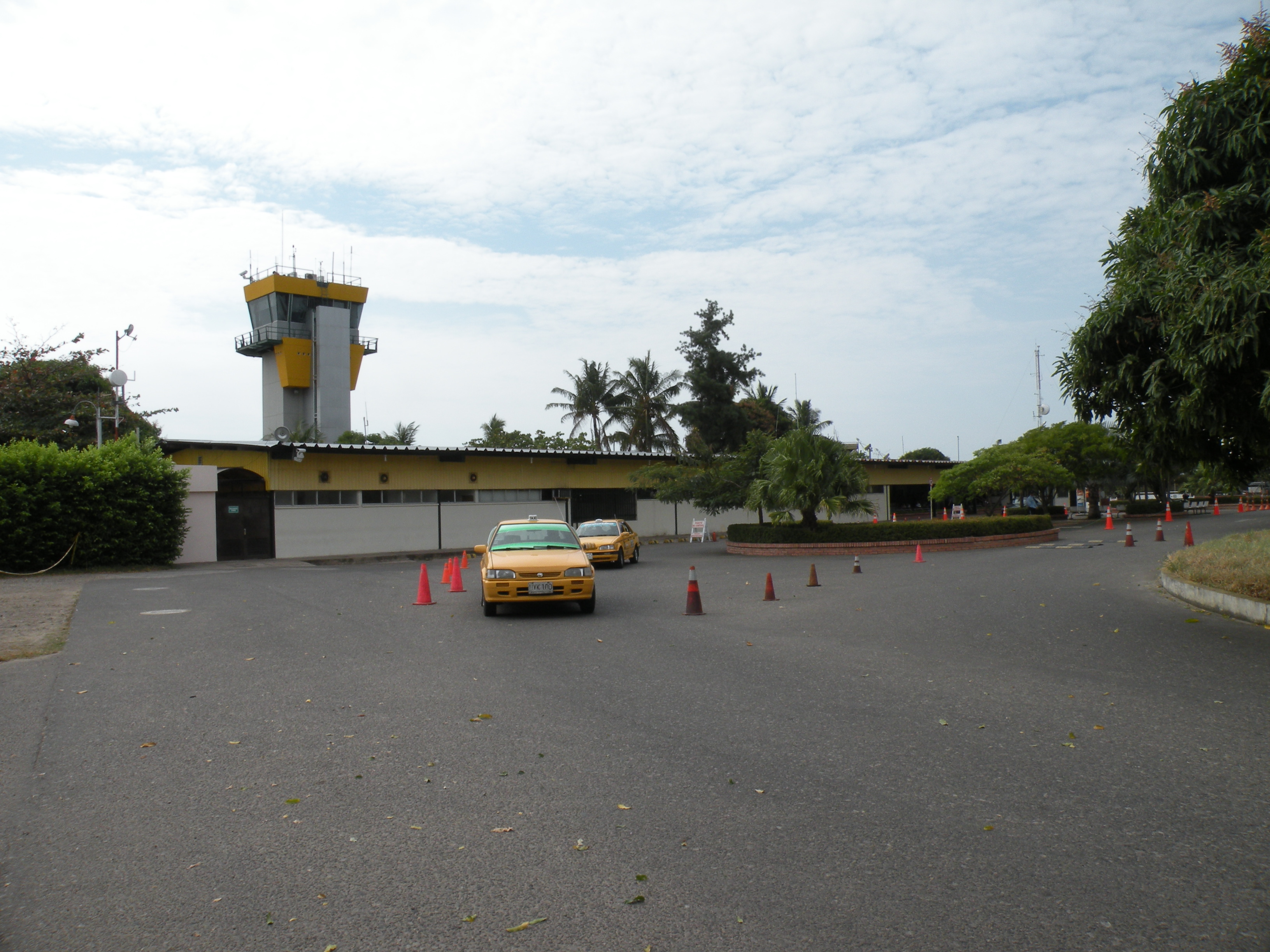 Aeropuerto El Alcaravan